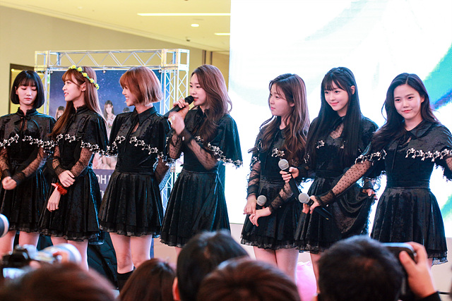 1월 21일 오마이걸 팬사인회